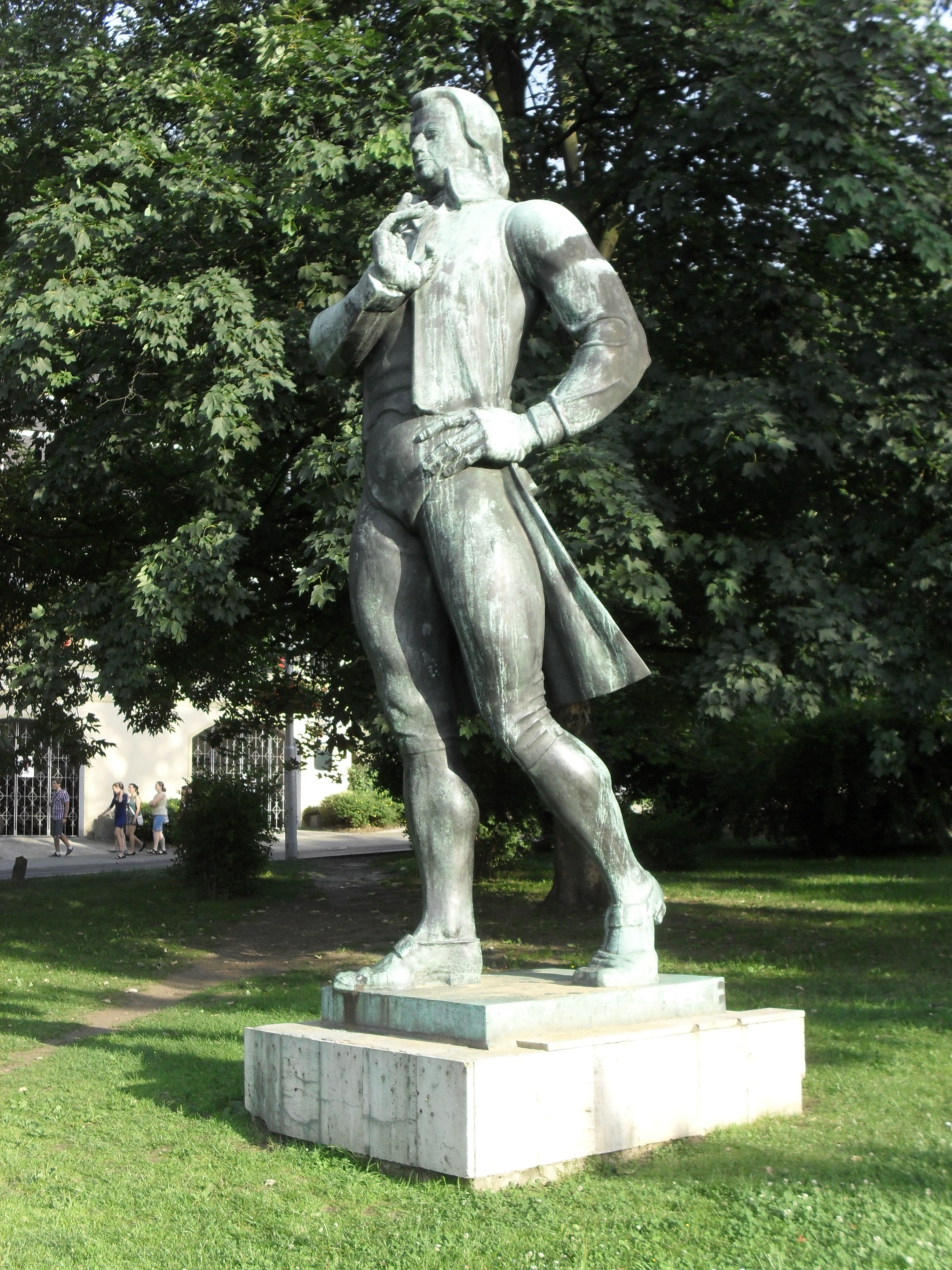 Mozartova socha poblíž lázní po něm pojmenovaných.